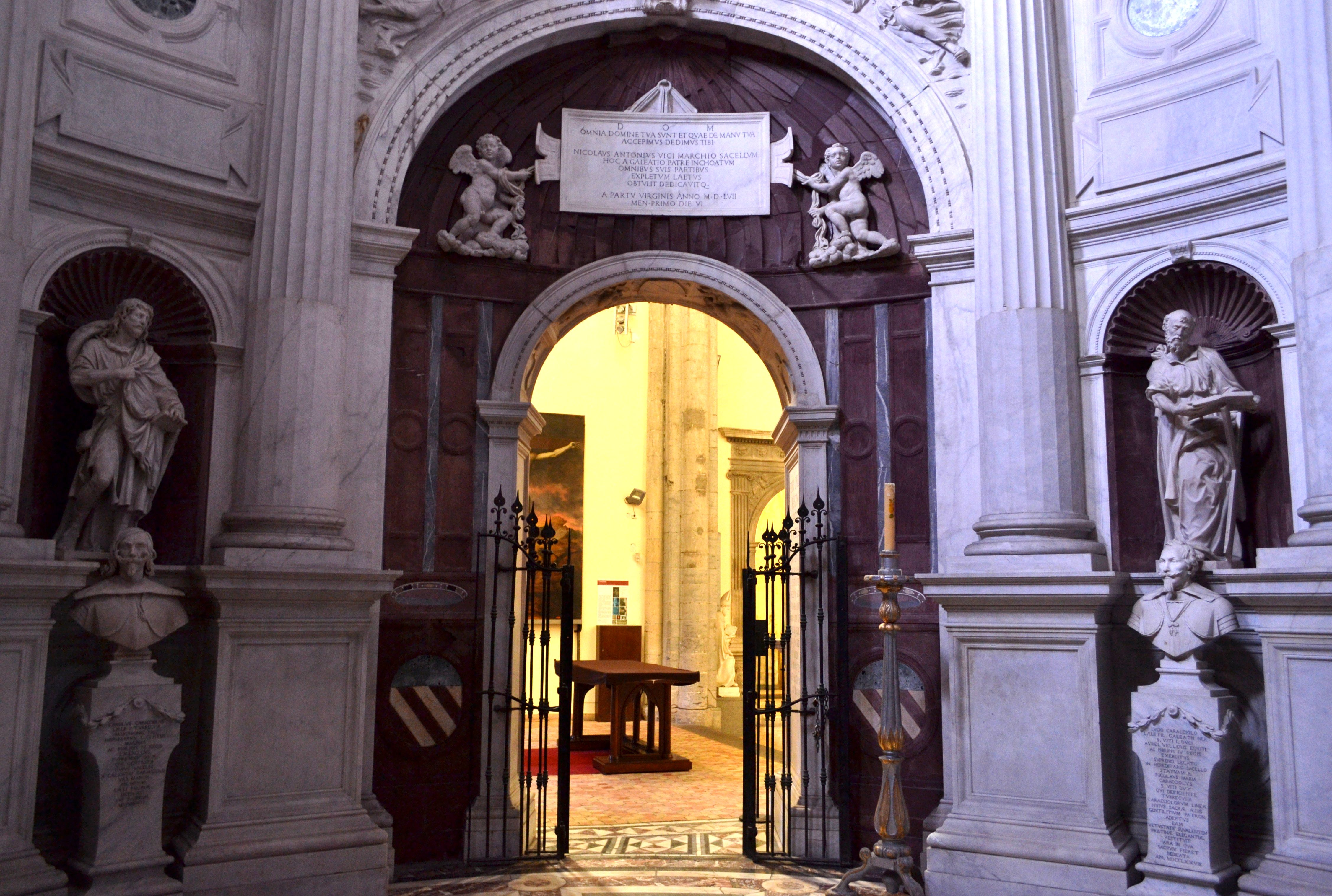 Cappella Caracciolo di Vico (Chiesa di San Giovanni Maggiore di Napoli) - A sinistra è il busto di Lucio Caracciolo della bottega di Giuseppe Sanmartino; a destra il busto di Carlo Andrea Caracciolo di Ercole Ferrata del 1643. Alle spalle, nelle nicchie, due apostoli di scuola del da Nola.